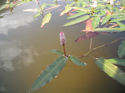 photo by Associazione Pescatori Primiero